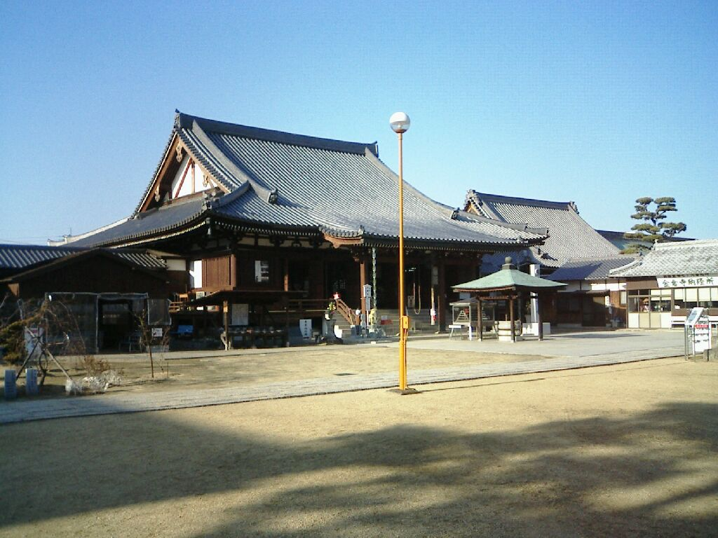 金倉寺